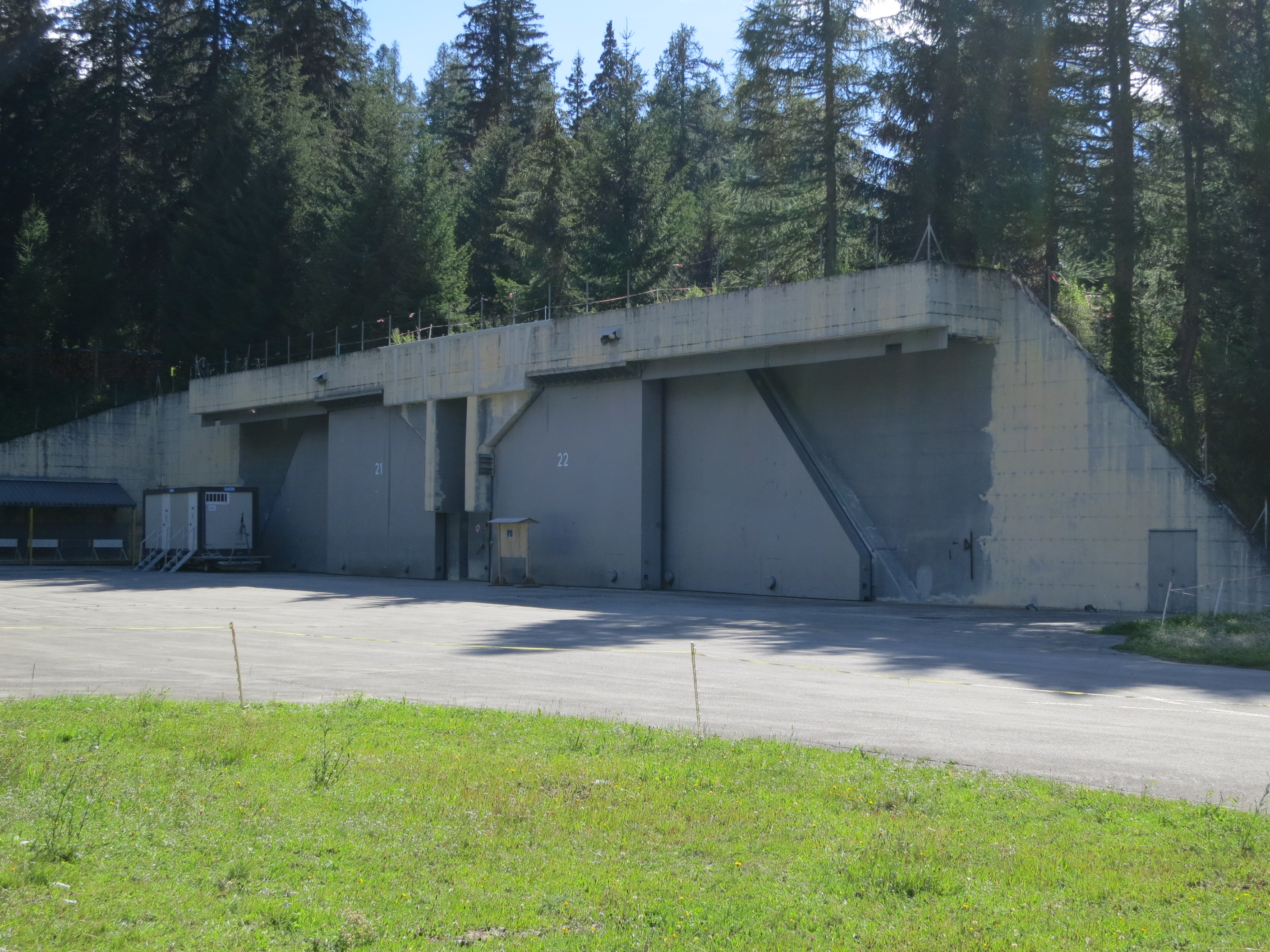 Flugplatz Ulrichen VS, Schweiz